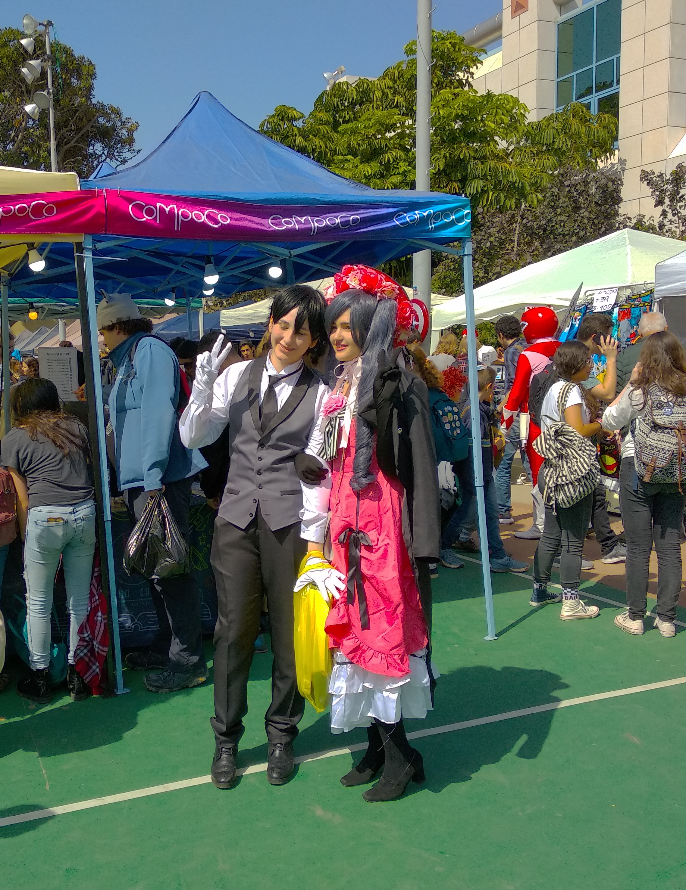 דמויות בכנס "עולמות 2019"